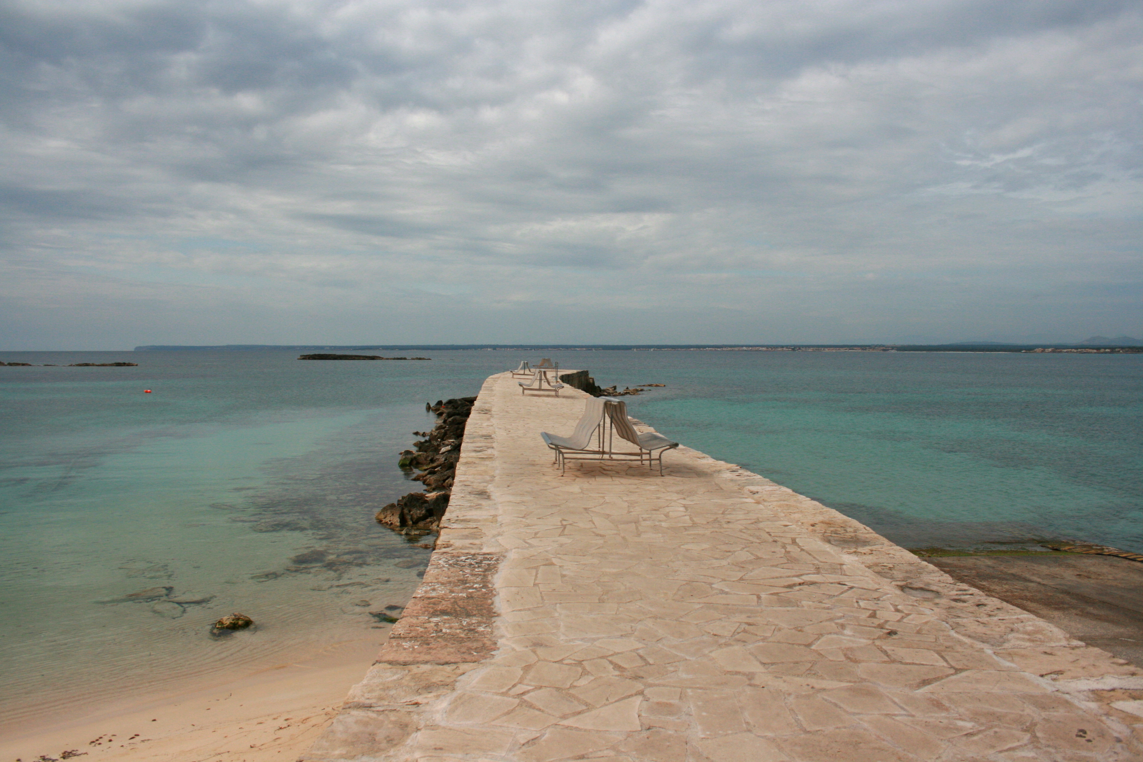 Colònia de Sant Jordi in Ses Salines, Mallorca, Spain